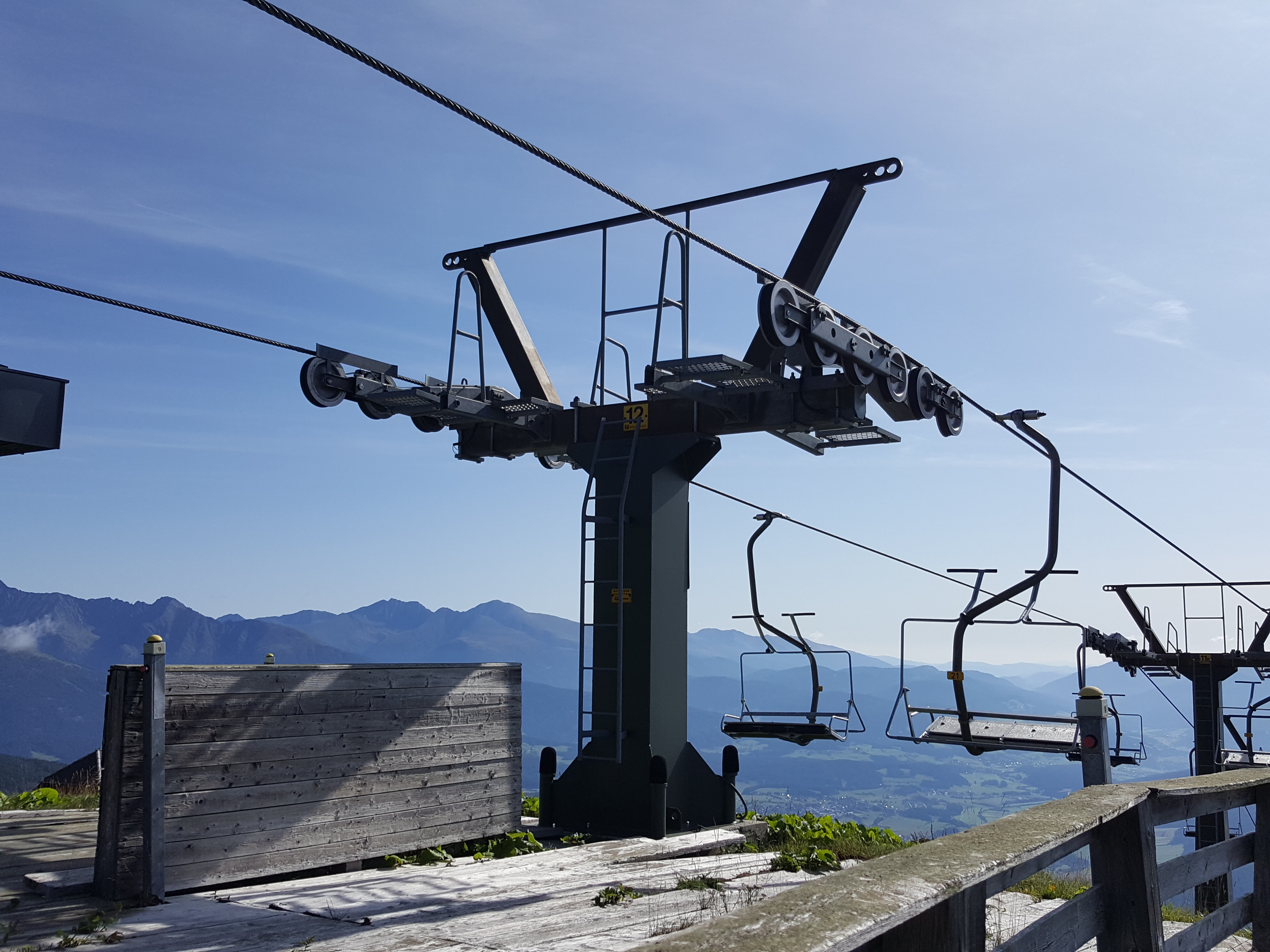 Die Dreiersesselbahn "Grosseck II" im Skigebiet Grosseck-Speiereck. Die einzige Dreiersesselbahn, welche jemals von der Firma erstellt wurde.